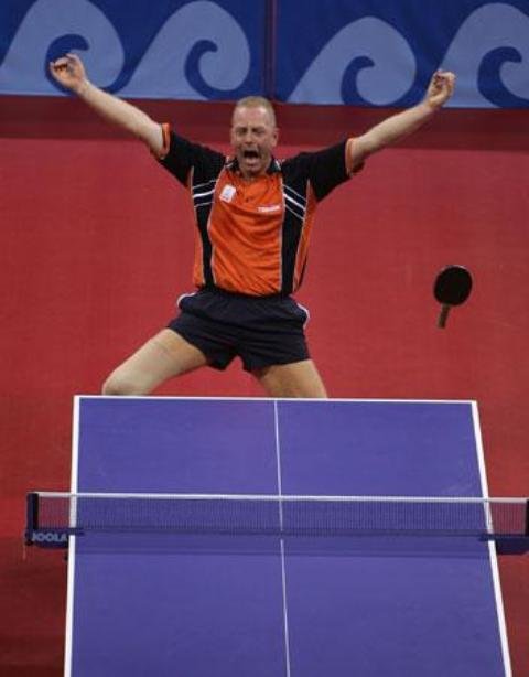 Tonnie Heijnen